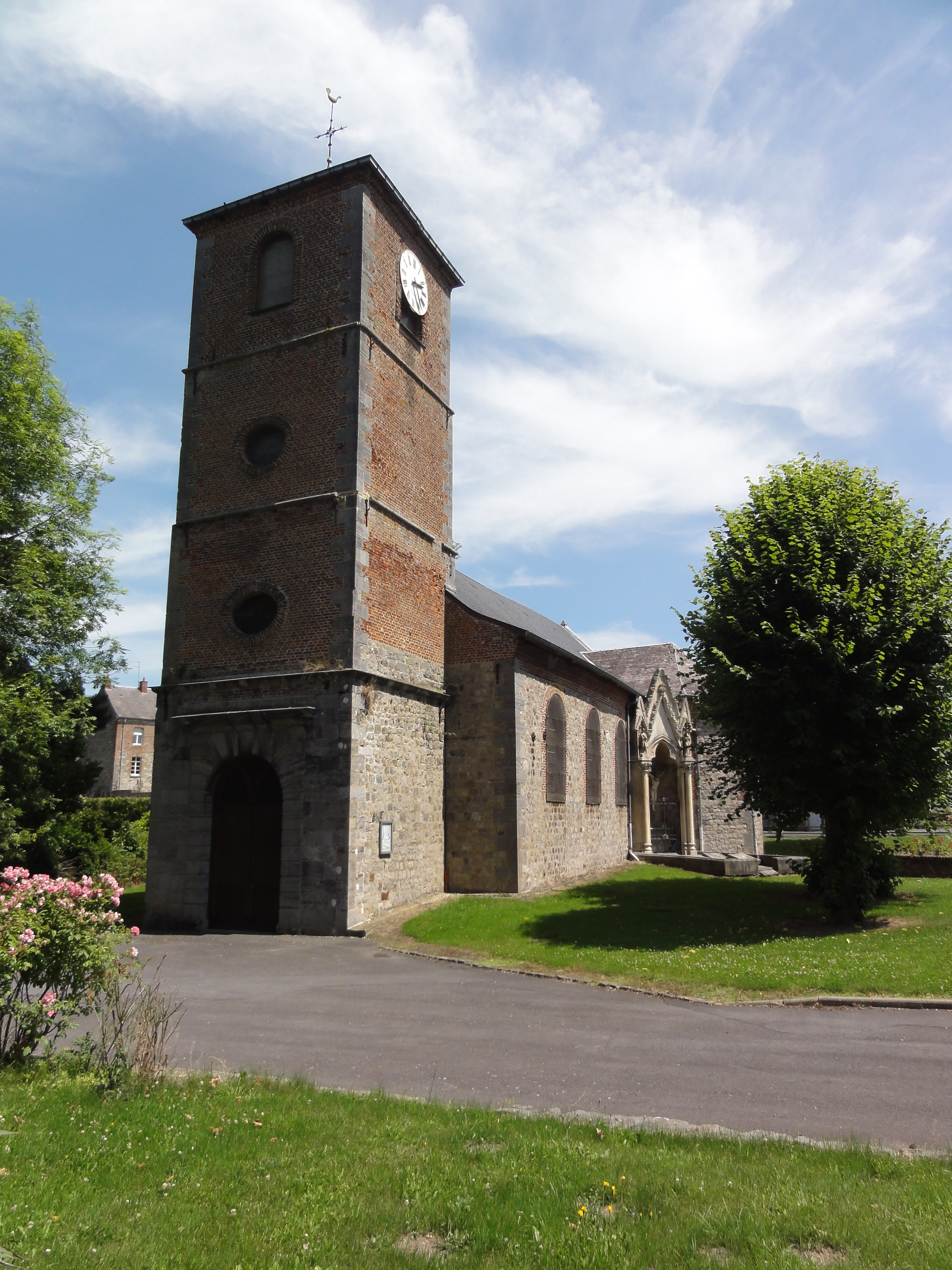 Saint-Waast-la-Vallée (Nord, Fr) église